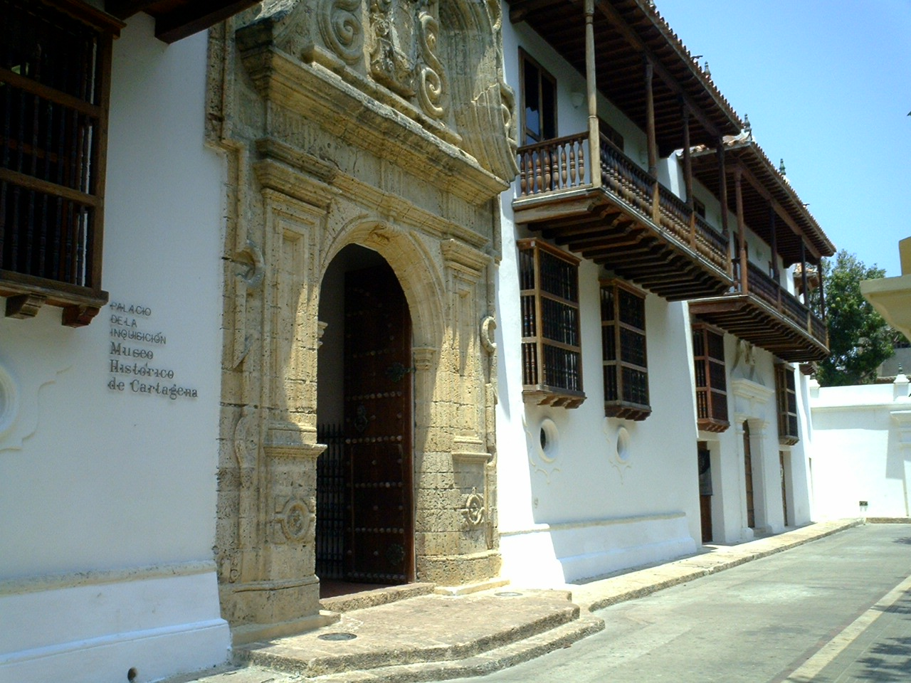 Cartagena, Colombia. Palacio de La Inquisición.